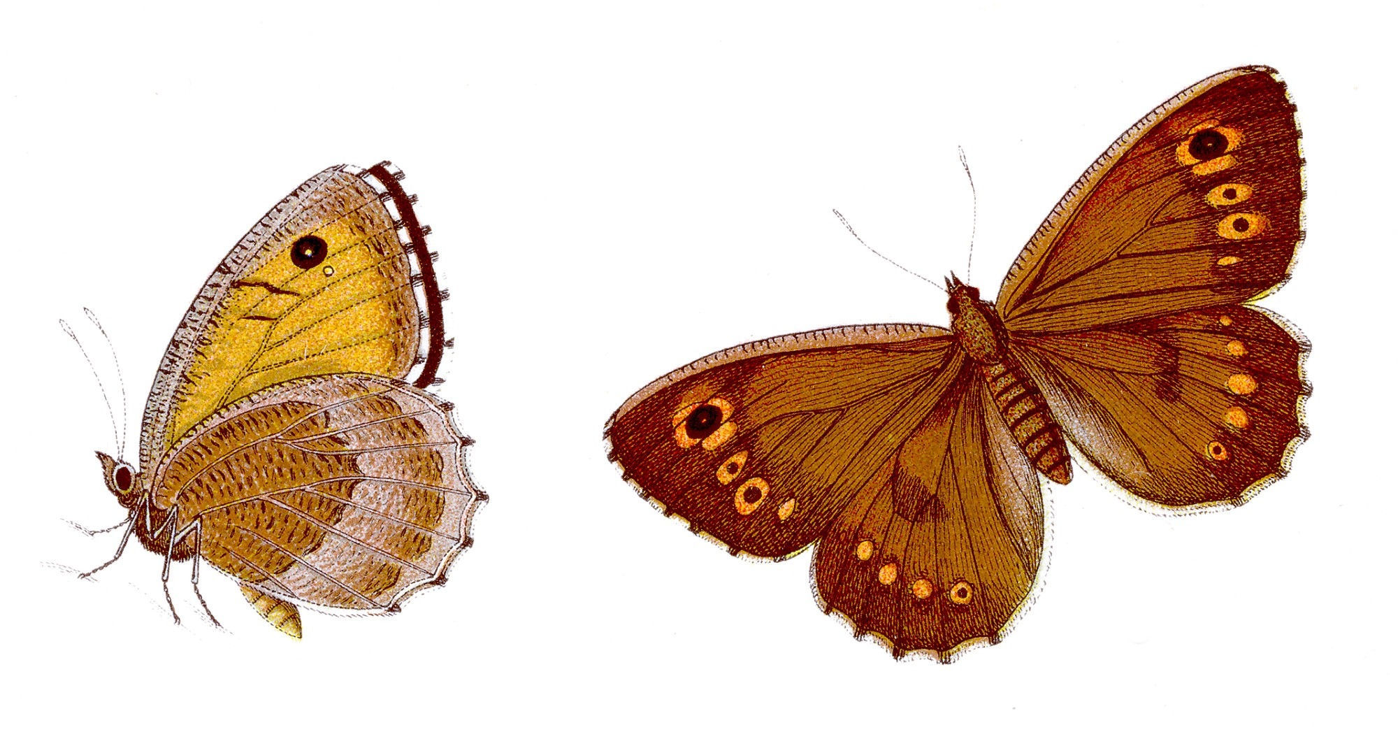 Rotbindiger Samtfalter - Arethusana arethusa